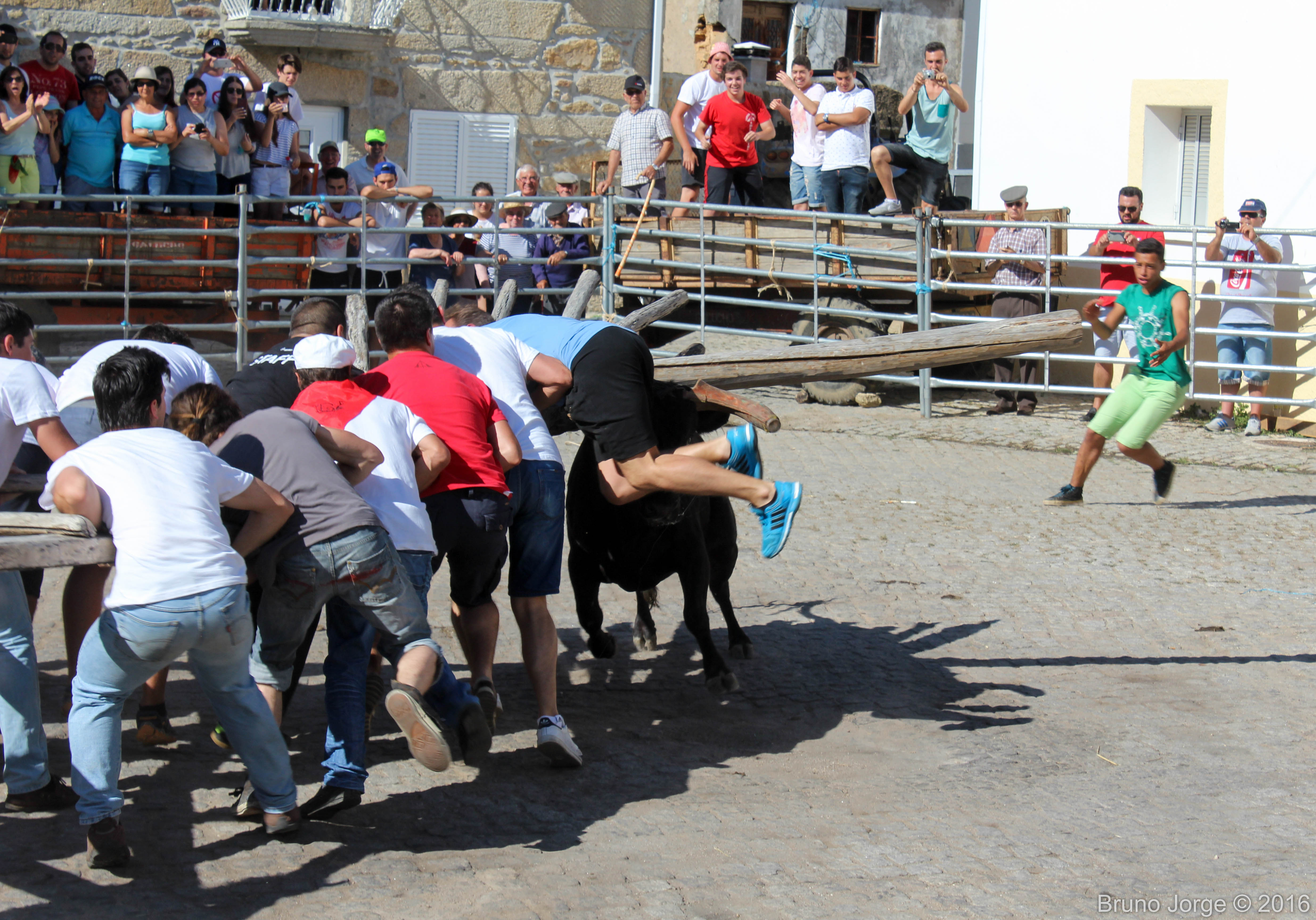 Foto captada em Aldeia Da Ponte